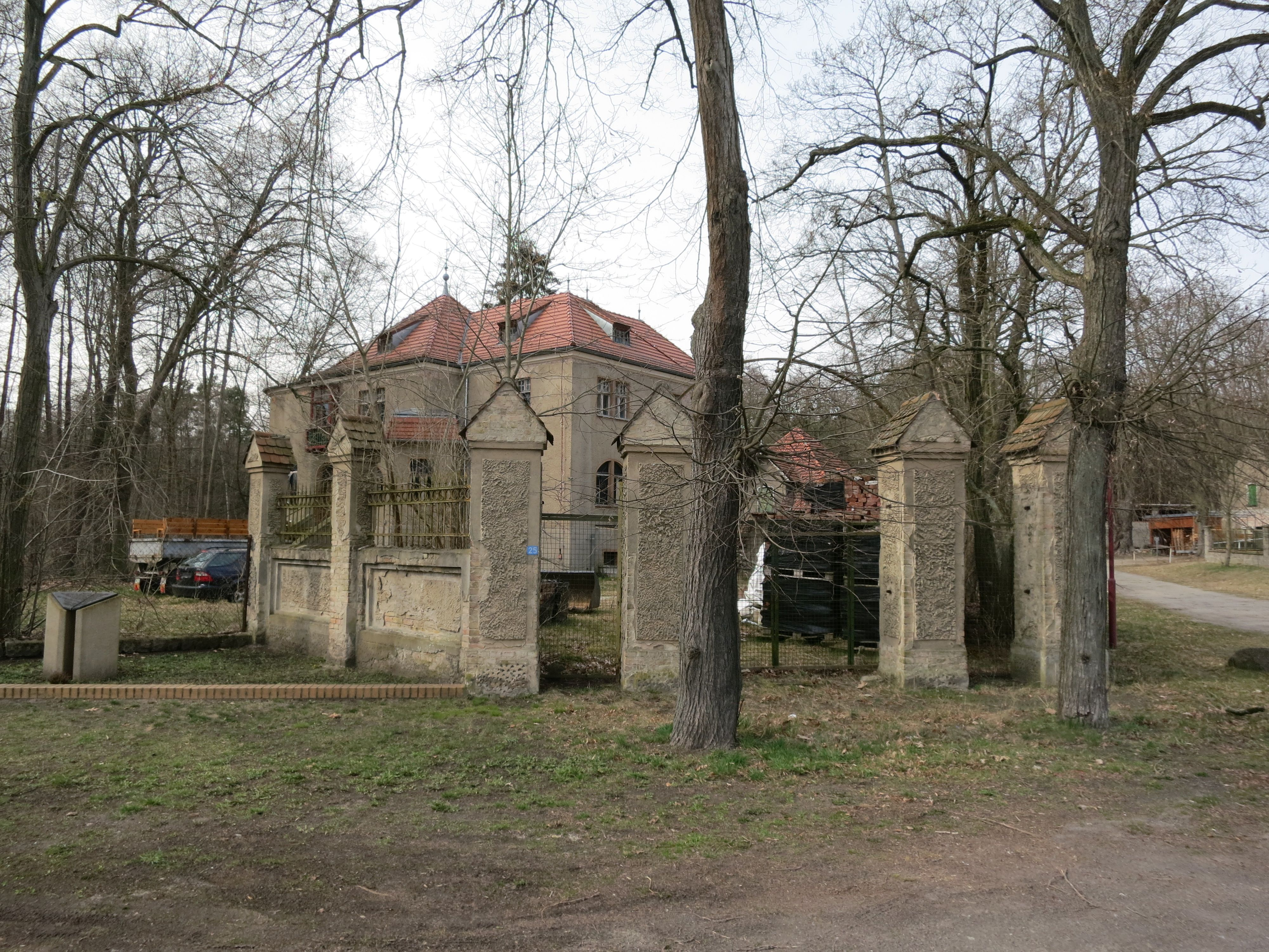 "Jagdidyll Berdotaris" bei Ahrensdorf (Gemeinde Nuthe-Urstromtal), in den 1930 als Landwerk Ahrensdorf in einem Hachschara-Lager jüdische Jugendliche auf die Ausreise nach Palästina vorbeitet wurden. Früherer Eingangsbereich